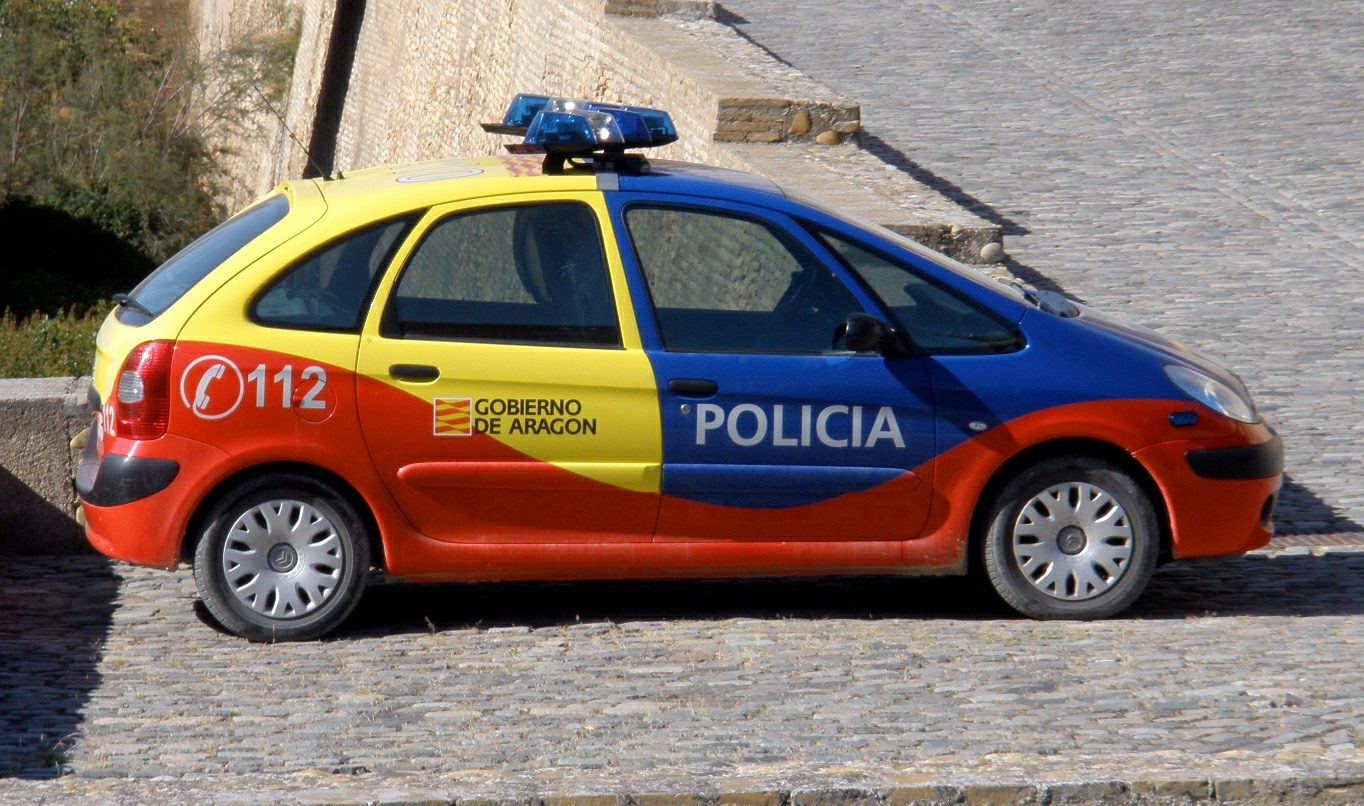 Coche de la Policía Nacional de España adscrita al Gobierno Autónomo de Aragón, aparcado en la Aljafería de Zaragoza